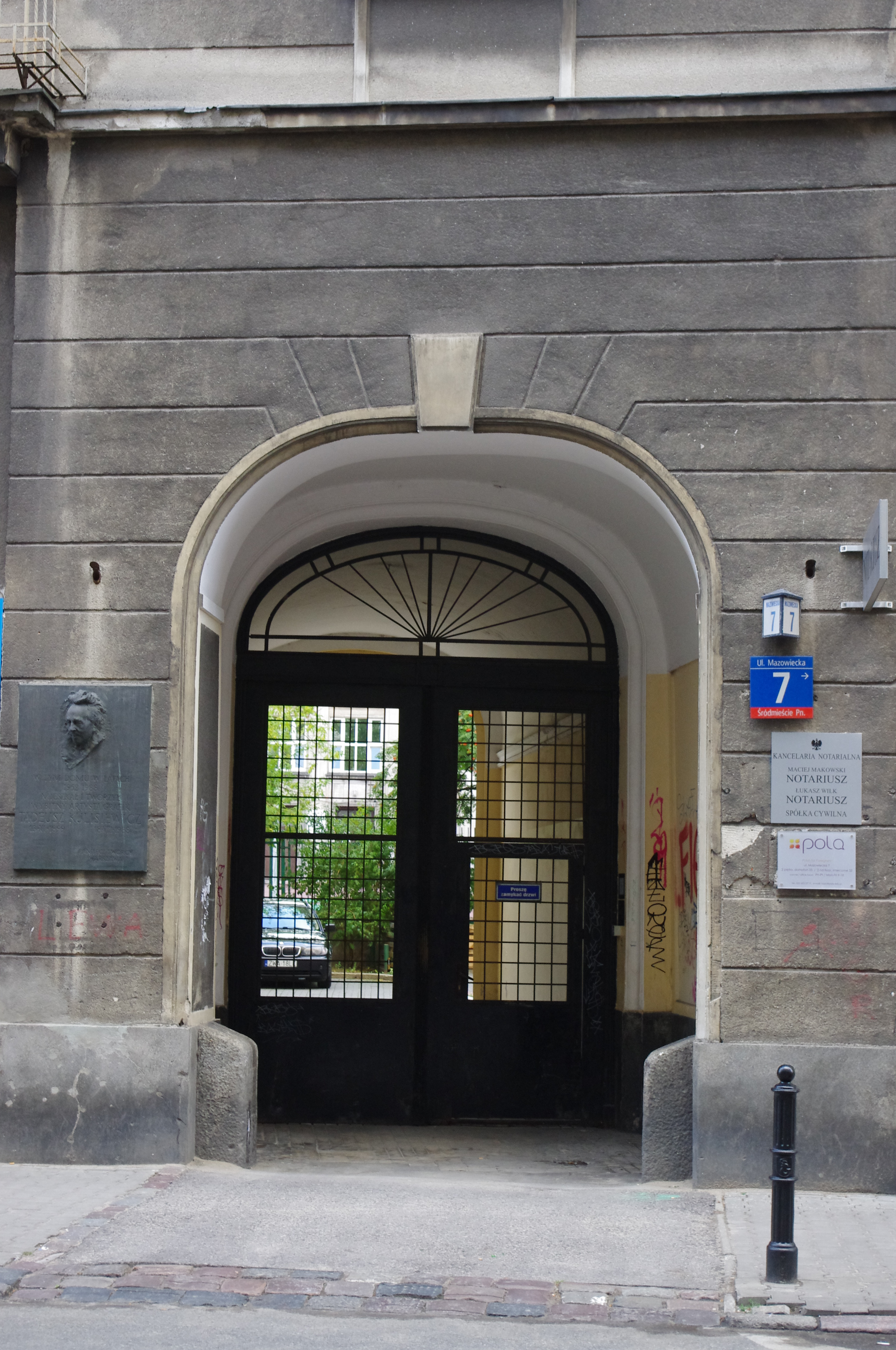 Kamienica przy Mazowieckiej 7 w Warszawie z widoczną tablicą upamiętniającą grafika Tadeusza Kulisiewicza